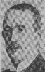 Arkitekten Karl Erikson